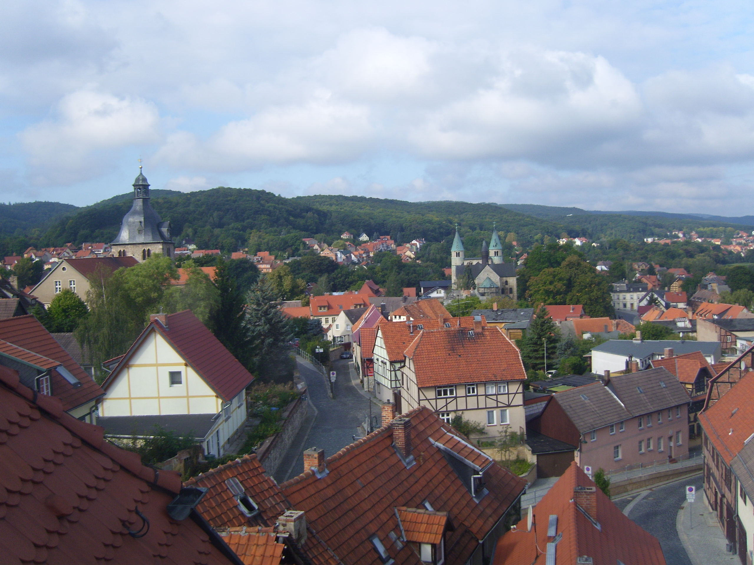 Gernrode Ortsansicht - Aufnahme vom Rathausdach